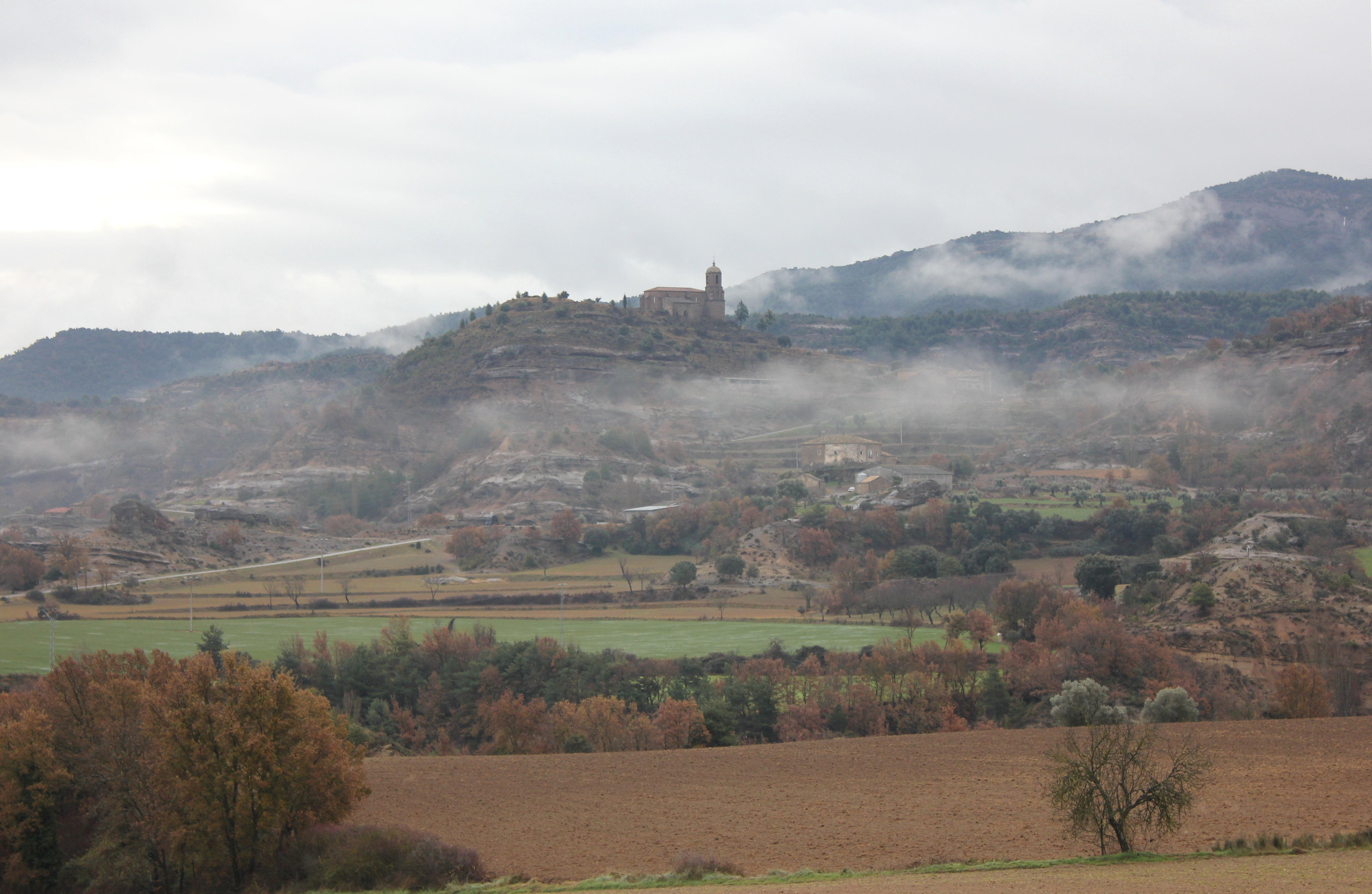 Aragonés: Paisache hibernal en a valle d'o Susía, con o Elsón d'entre as codicas de gallín que se dispersa de maitín. Foto feita dende o vicino Mondot.